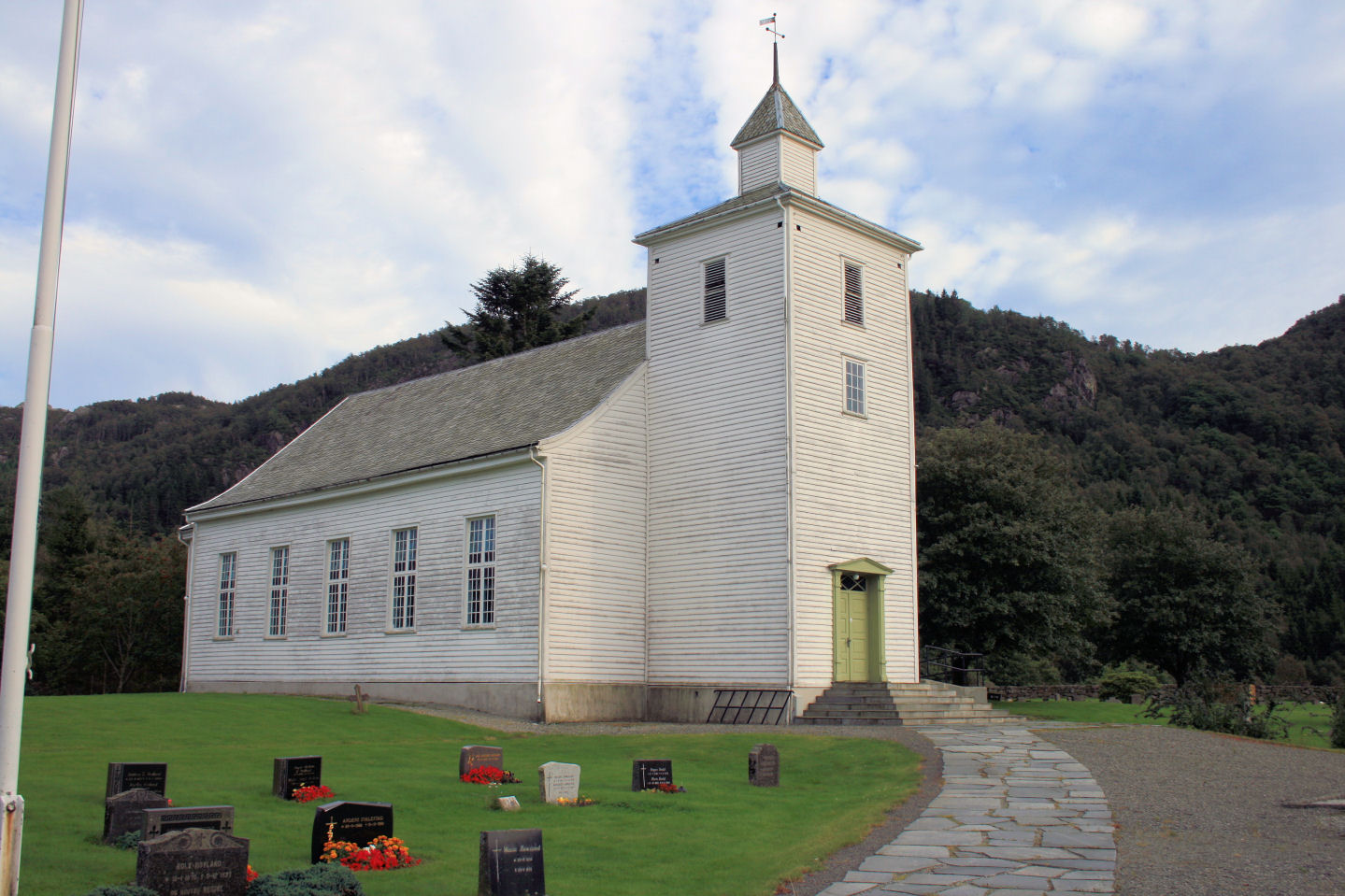 Helleland Kirke, Rogaland